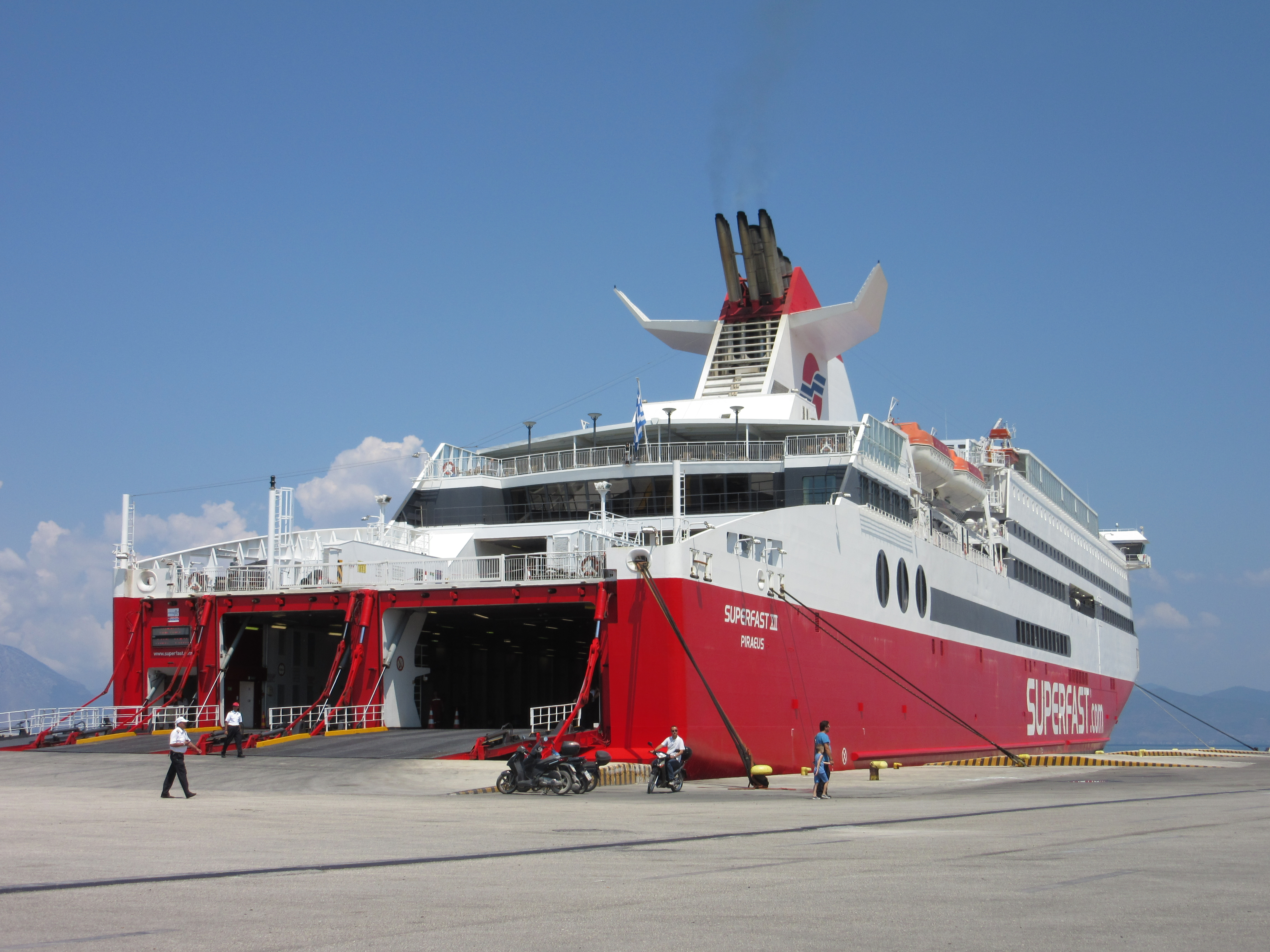 Superfast XII in Ancona, Italien mit geöffneten Klappen